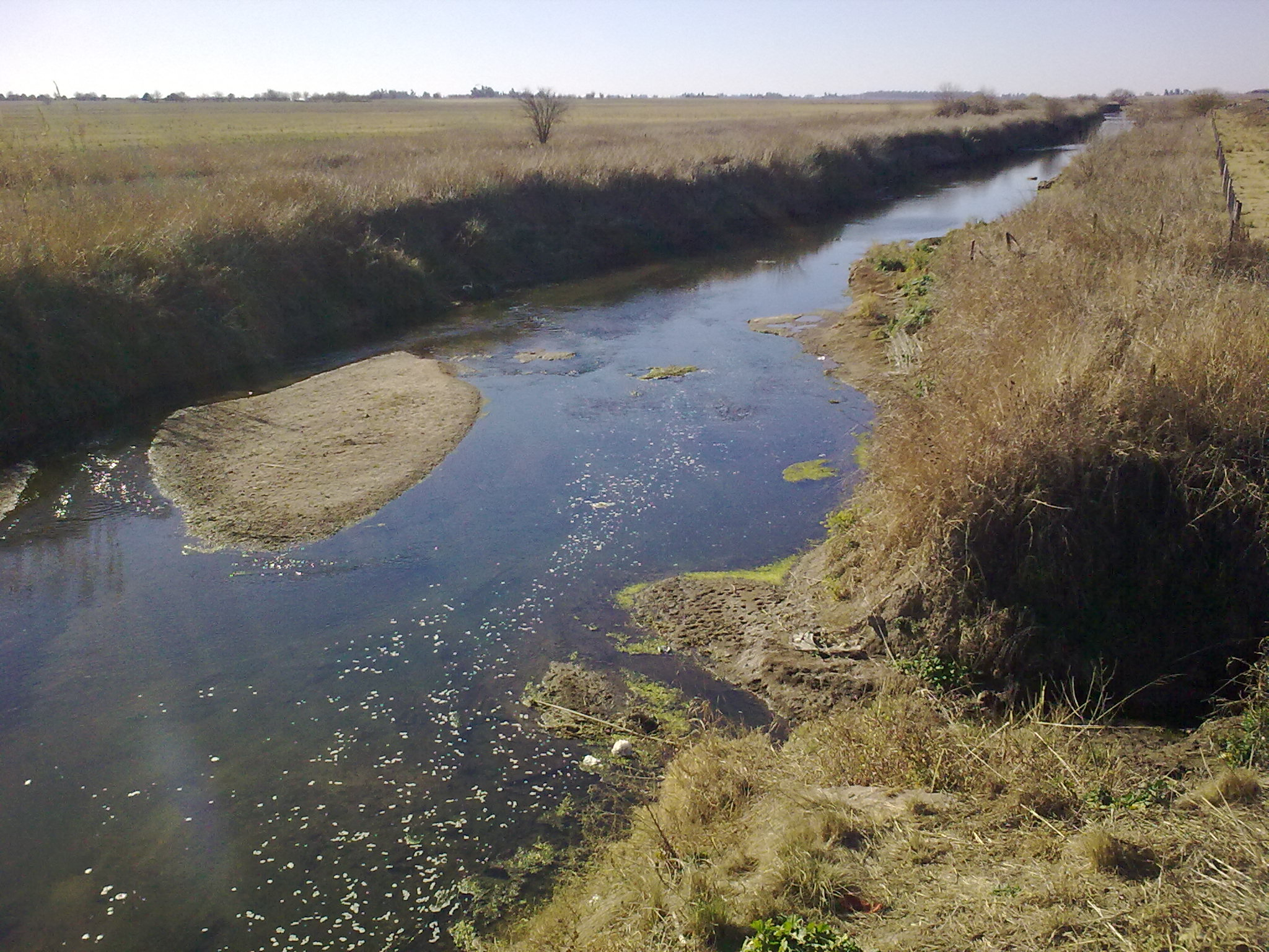 Esta foto esta sacada arriba del puente del arroyo saladillo, sobre la ruta 178, frente al autocamping de Sporting club social de bigand.